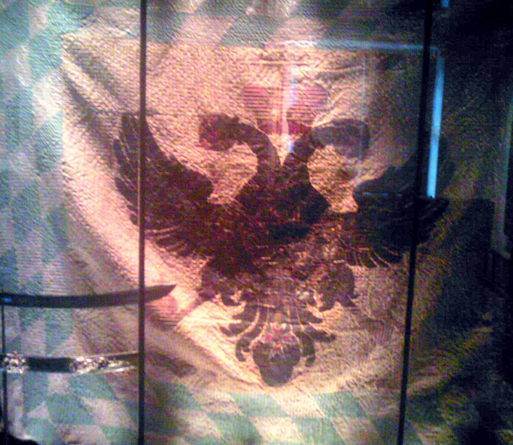 Kaiserlich bayerische Infanteriefahne